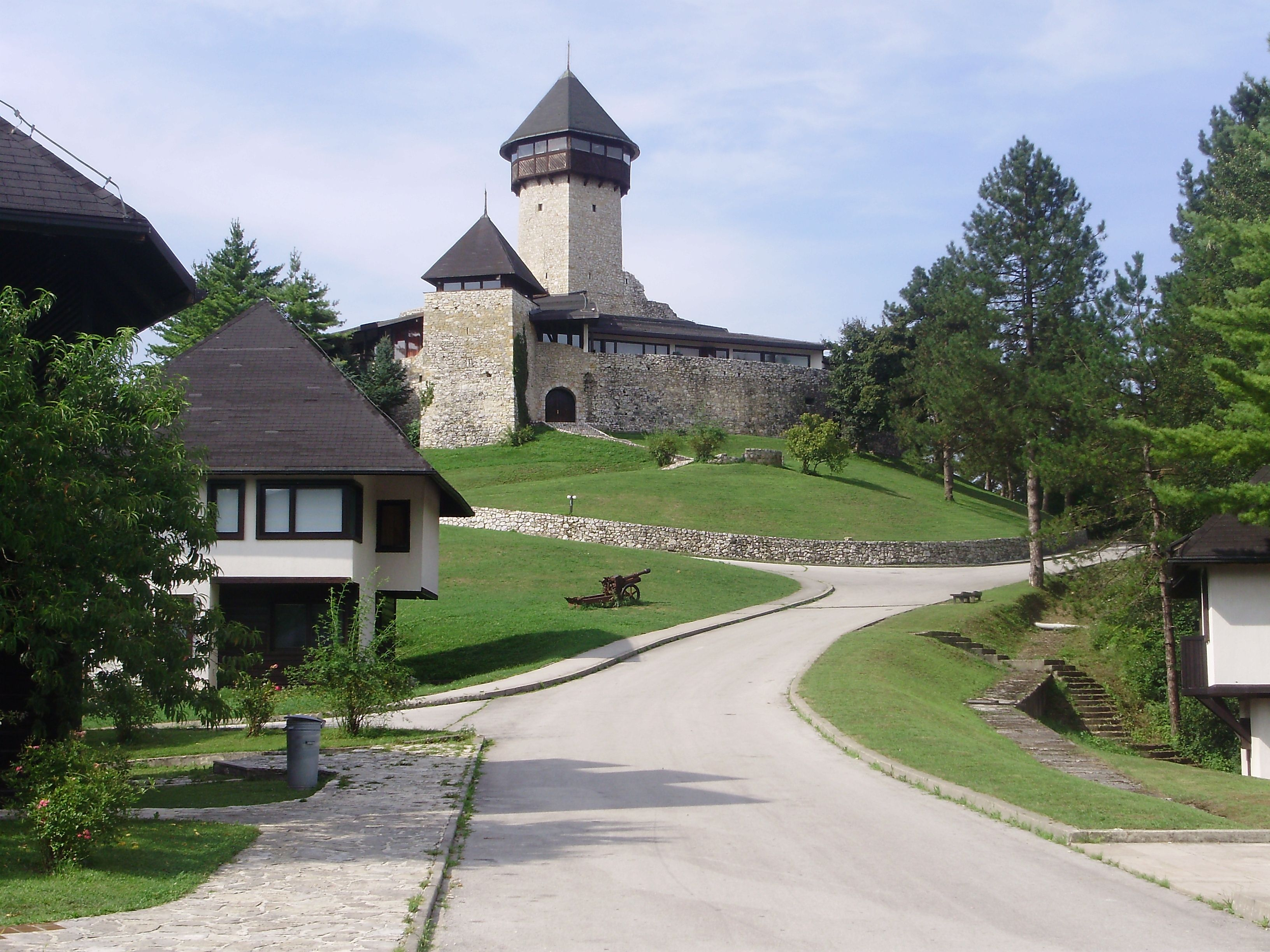 Stari grad u Velikoj Kladuši